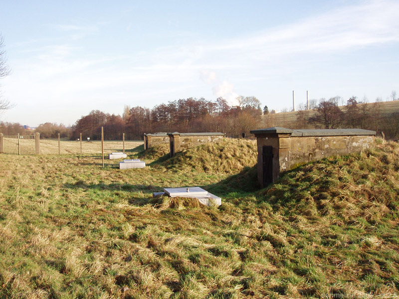 Brunnenanlage beim Ochsenbrunnen in Heilbronn-Neckargartach, erbaut im späten 19. Jahrhundert als Teil der Heilbronner Wasserversorgung.